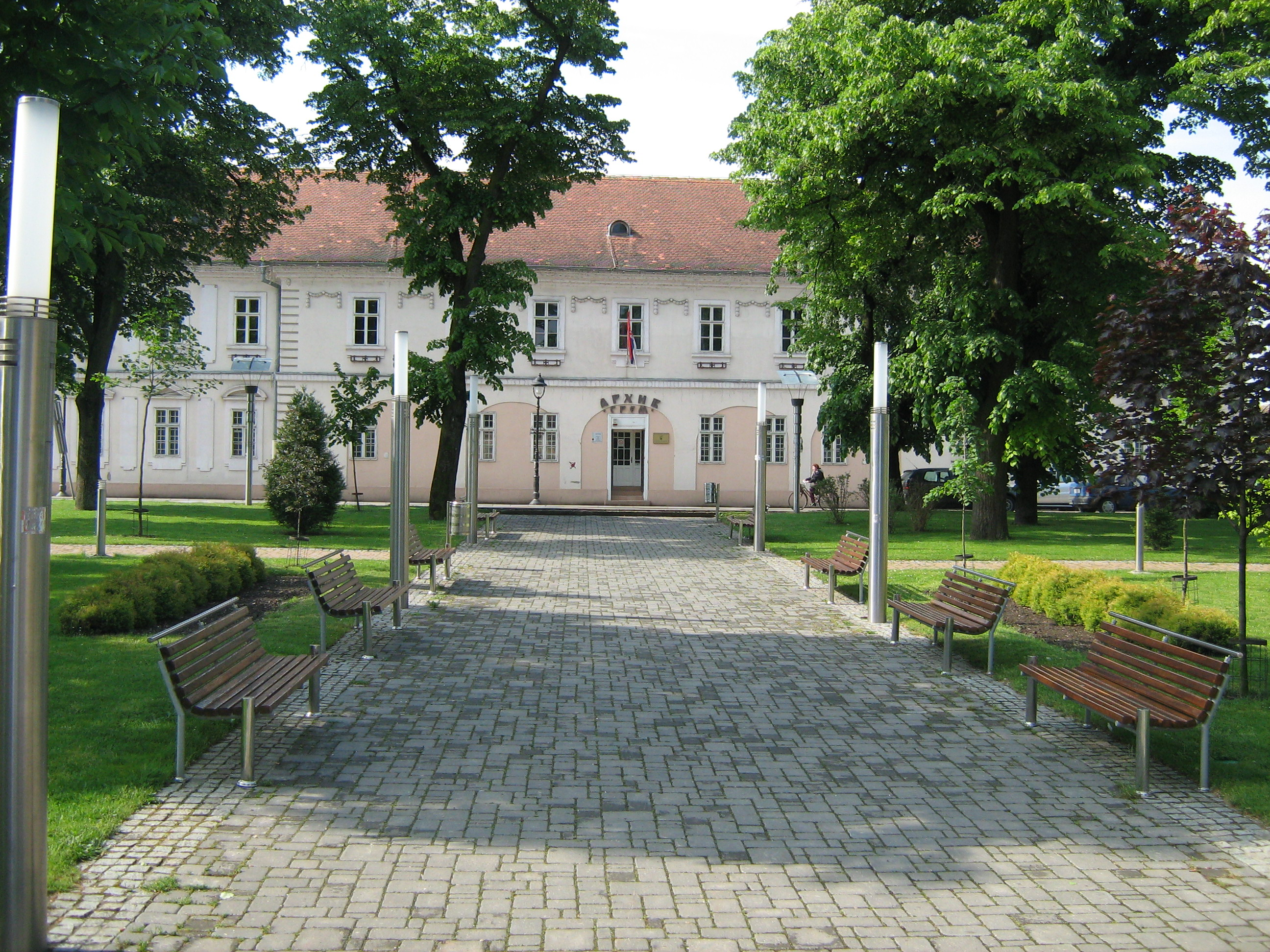 Зграда некадашње Главне страже, данас Историјски архив Срема